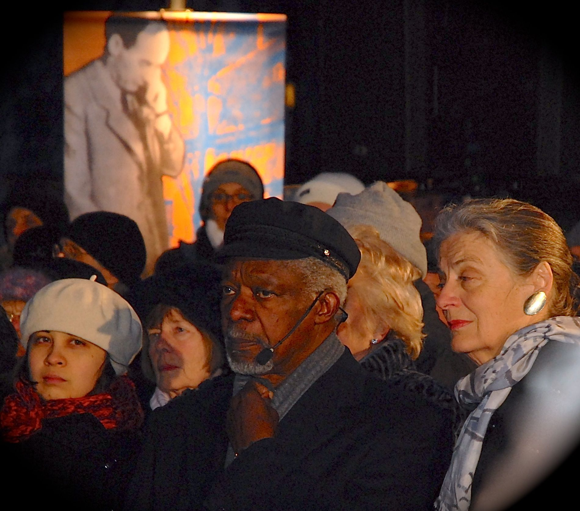 Kofi och Nane Annan på Förintelsens minnesdag den 27 januari 2013 på Raoul Wallenbergs torg i Stockholm.